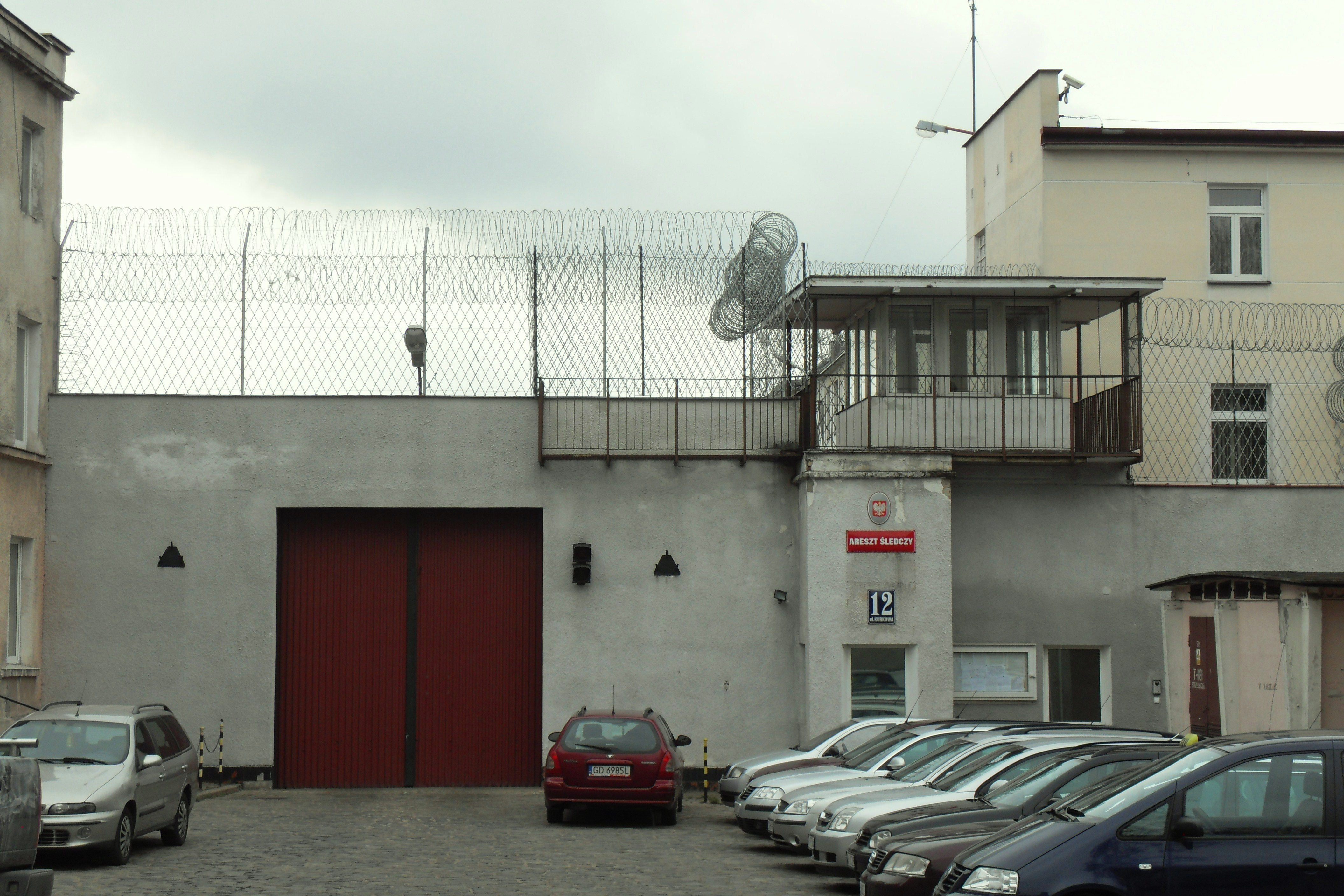 Gdańsk Śródmieście, ul. Kurkowa, brama aresztu.